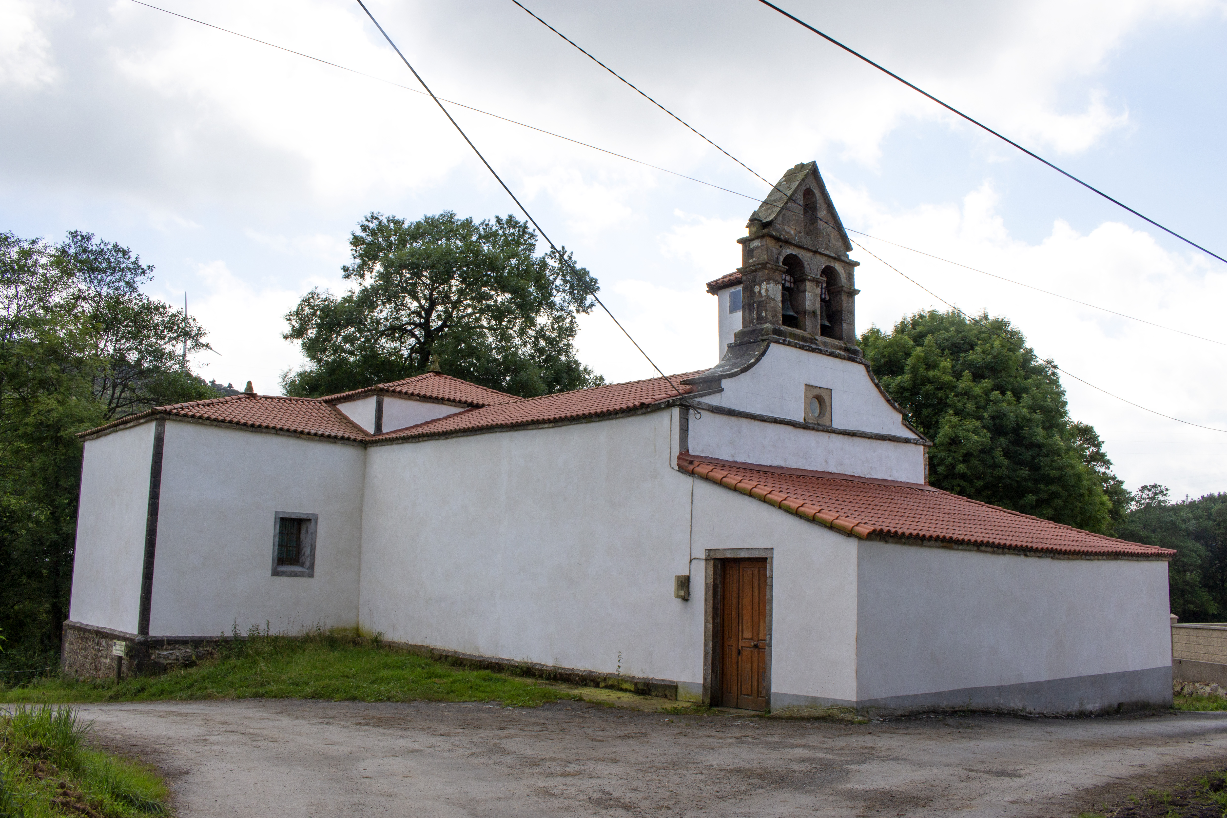 Bodenaya (Salas, Asturias)